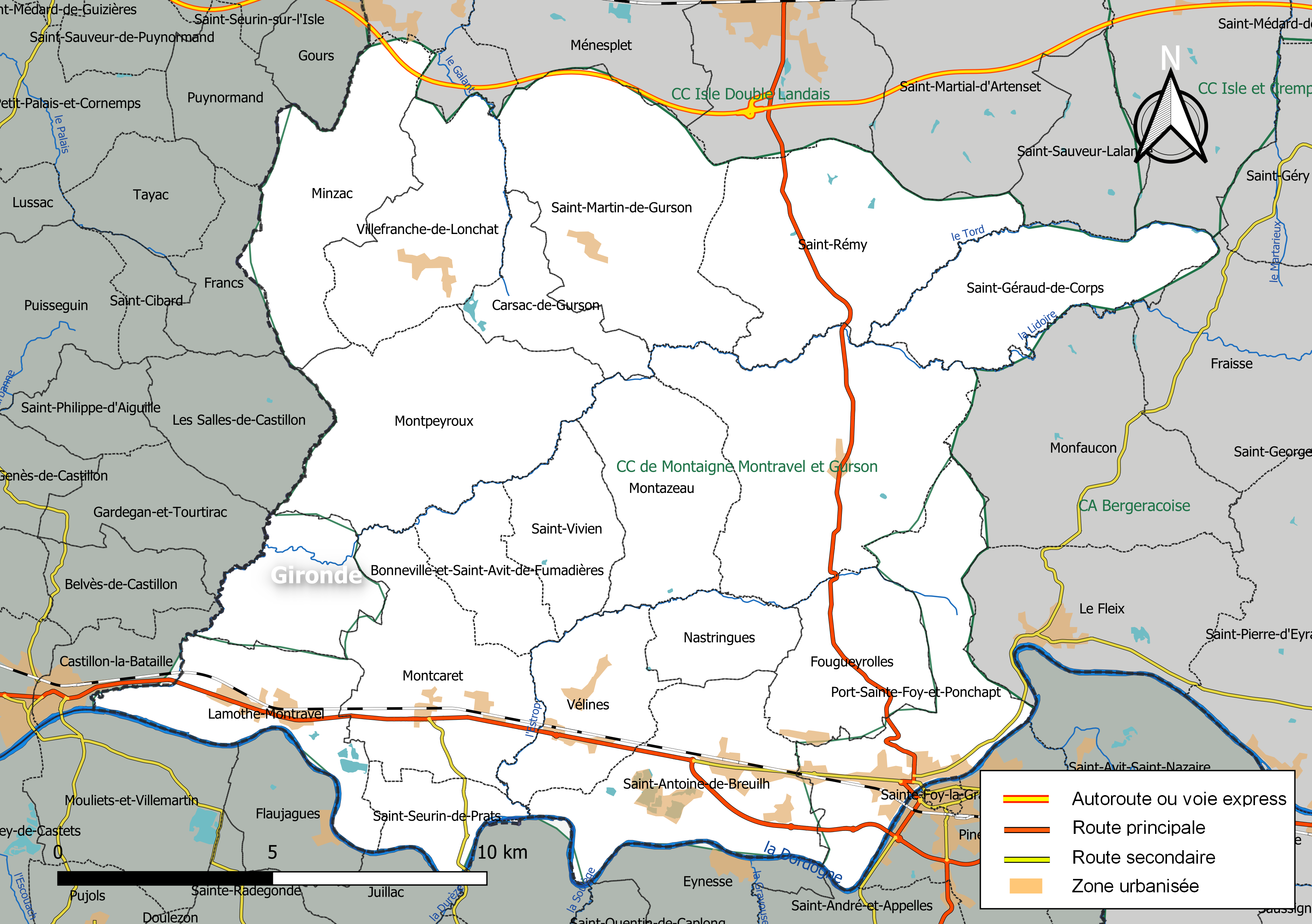 Carte géographique de la Communauté de communes de Montaigne Montravel et Gurson, département de la Dordogne, France. Composition au 1er janvier 2019.